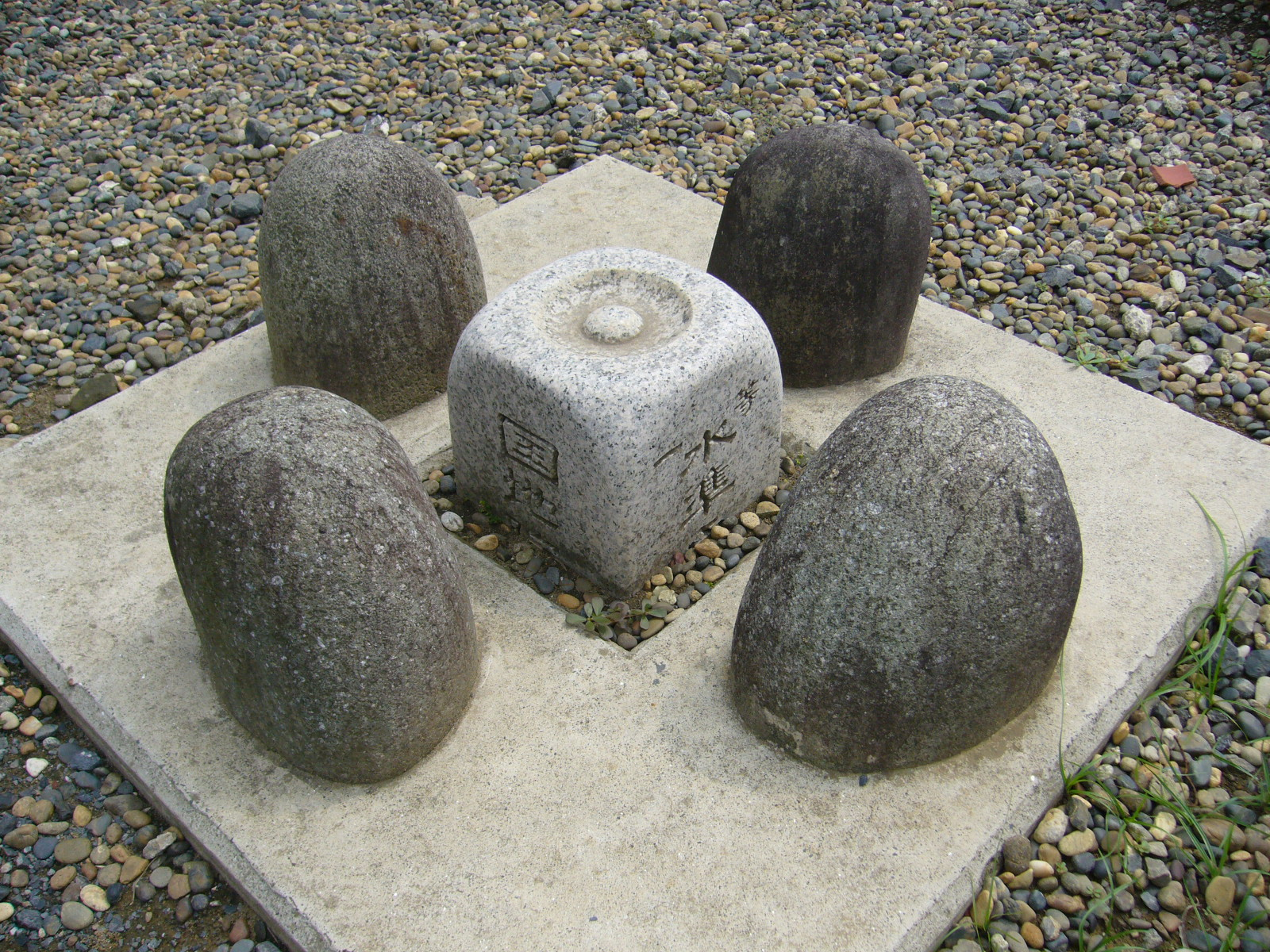 Japanese leveling datum point,suijyunten,katori-city,japan